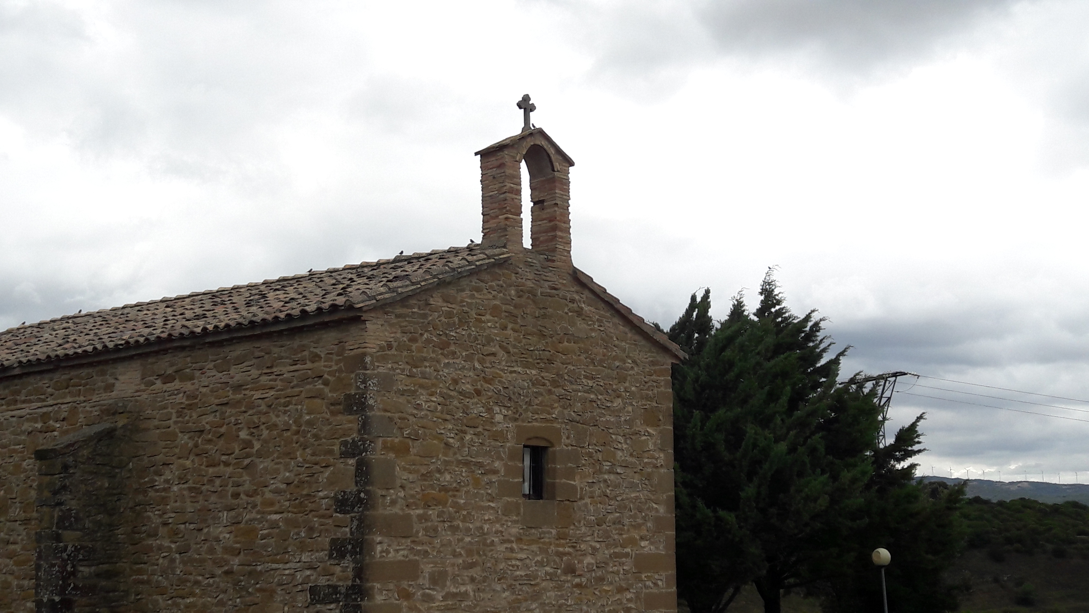 Foto de la ermita después de que quitasen la campana